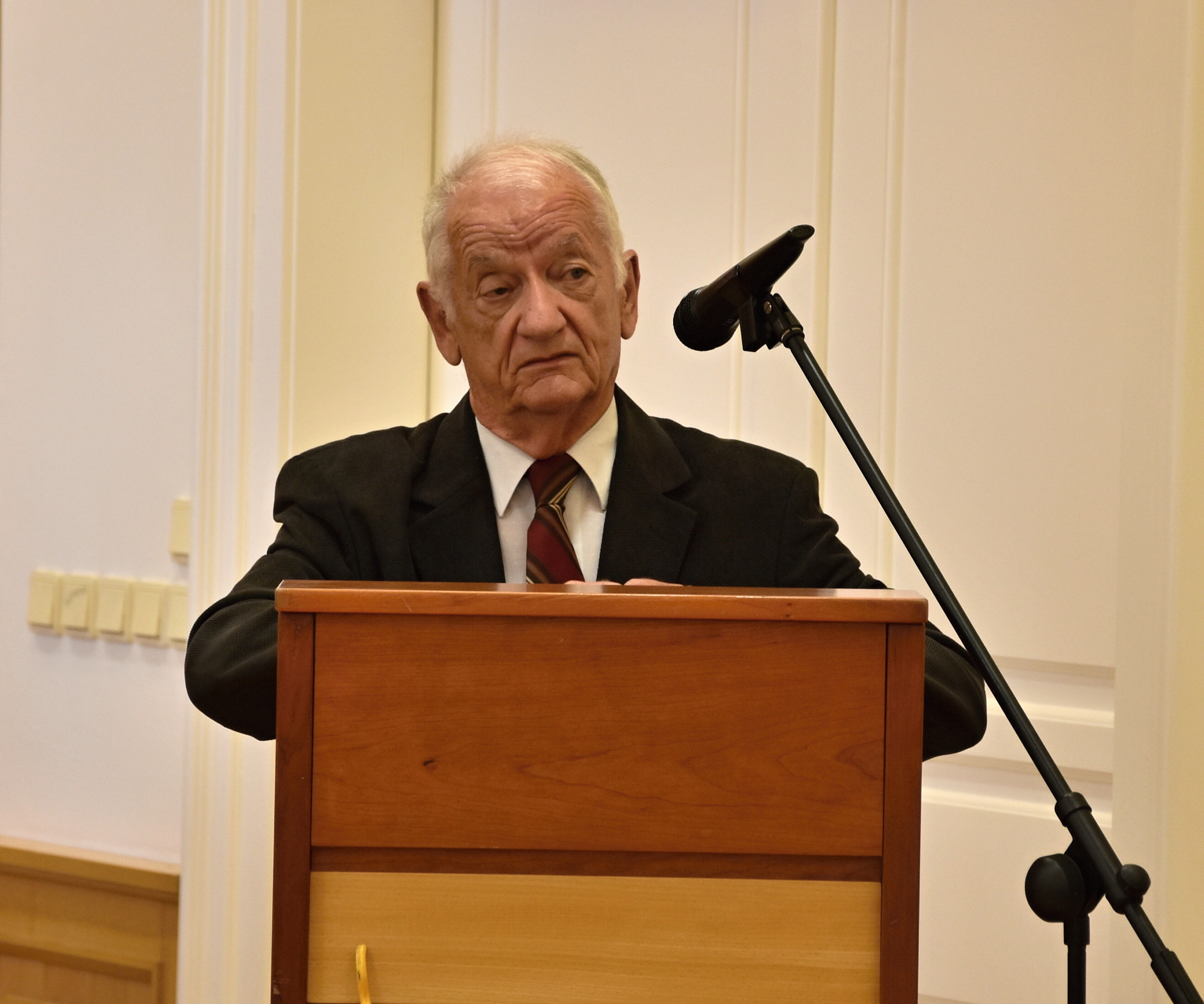 Historik Ivan Kamenec na mimoriadnom zasadnutí Slovenskej historickej spoločnosti v Trnave dňa 27. 9. 2019